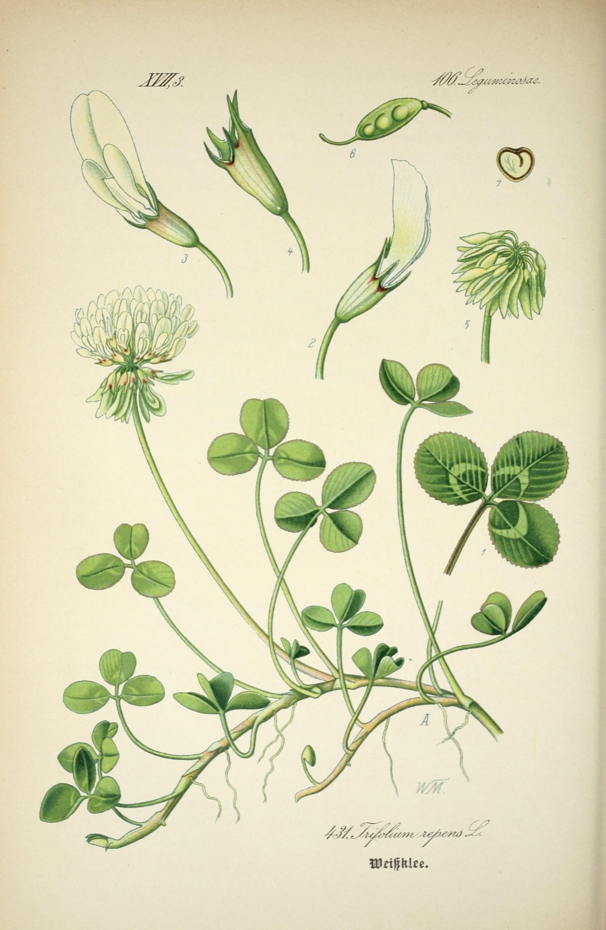 w. //S//^ -was. Weiftklze.